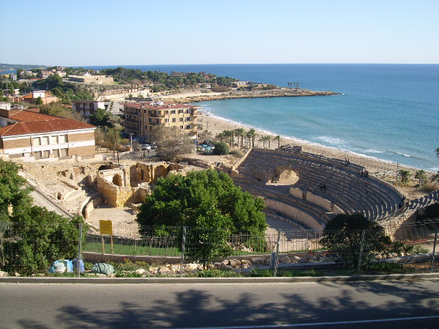 Anfiteatro romano, Tarragona, novembro 2009